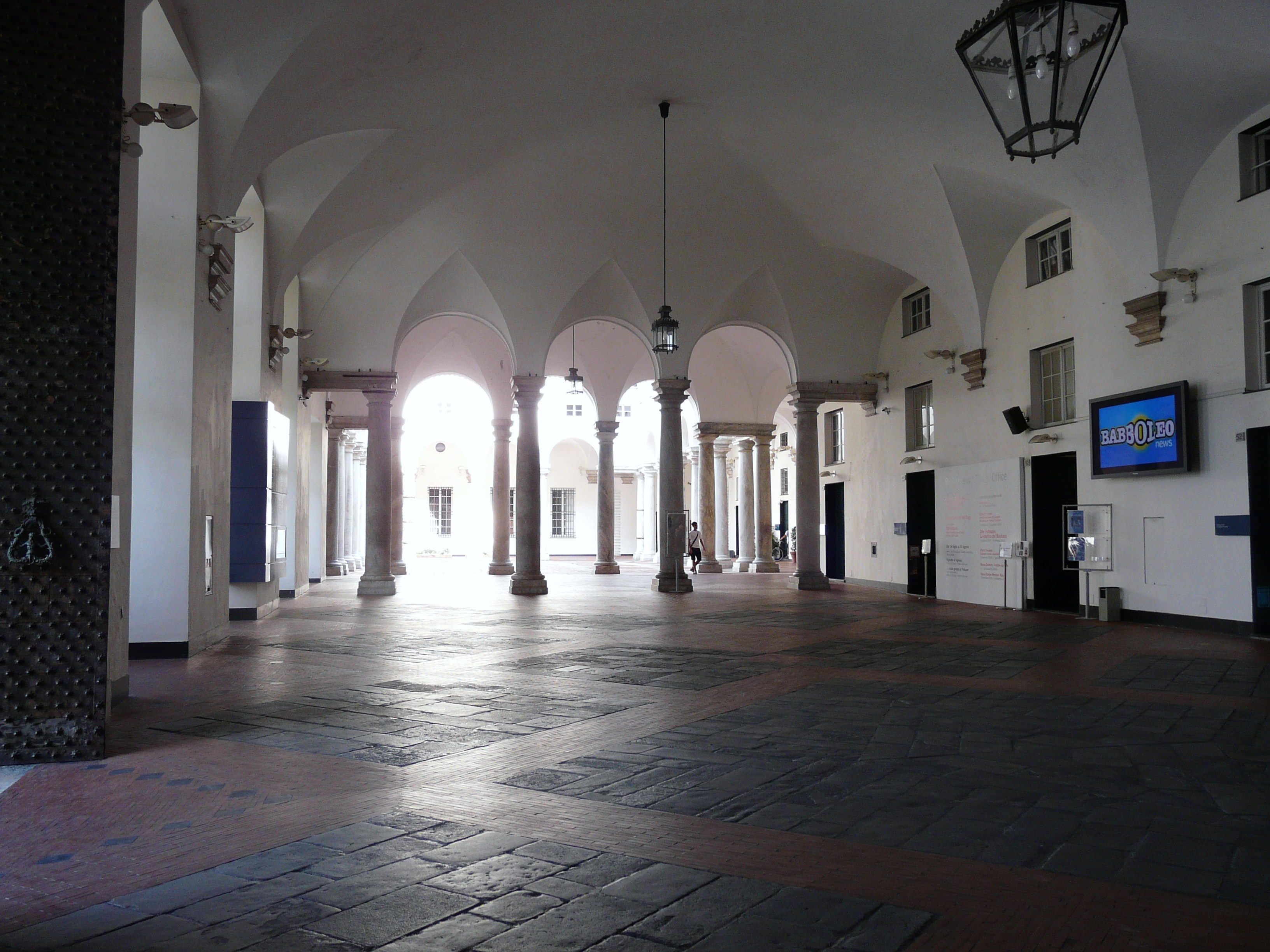 Porticato di Palazzo Ducale, Genova, Liguria, Italia